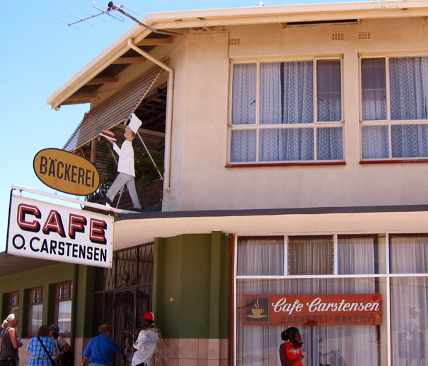 Bäckerei Carstensen in Otjiwarongo, nur ein Beispiel von vielen für die deutsche Sprache im namibischen Alltag. In diesem Café/Bäckerei gibt es hervorragende Vanille-Milkshakes und Rohhackbrötchen. Die Gäste sind vorwiegend Farmer, so dreht sich manches Tischgespräch um Regenfall, Schutz des Viehes vor Geparden und ähnlichem. Geführt von einer gebürtigen Schweizerin und ihrem Gatten, trifft man im Laden auch auf feinste Schweizer Schokolade.